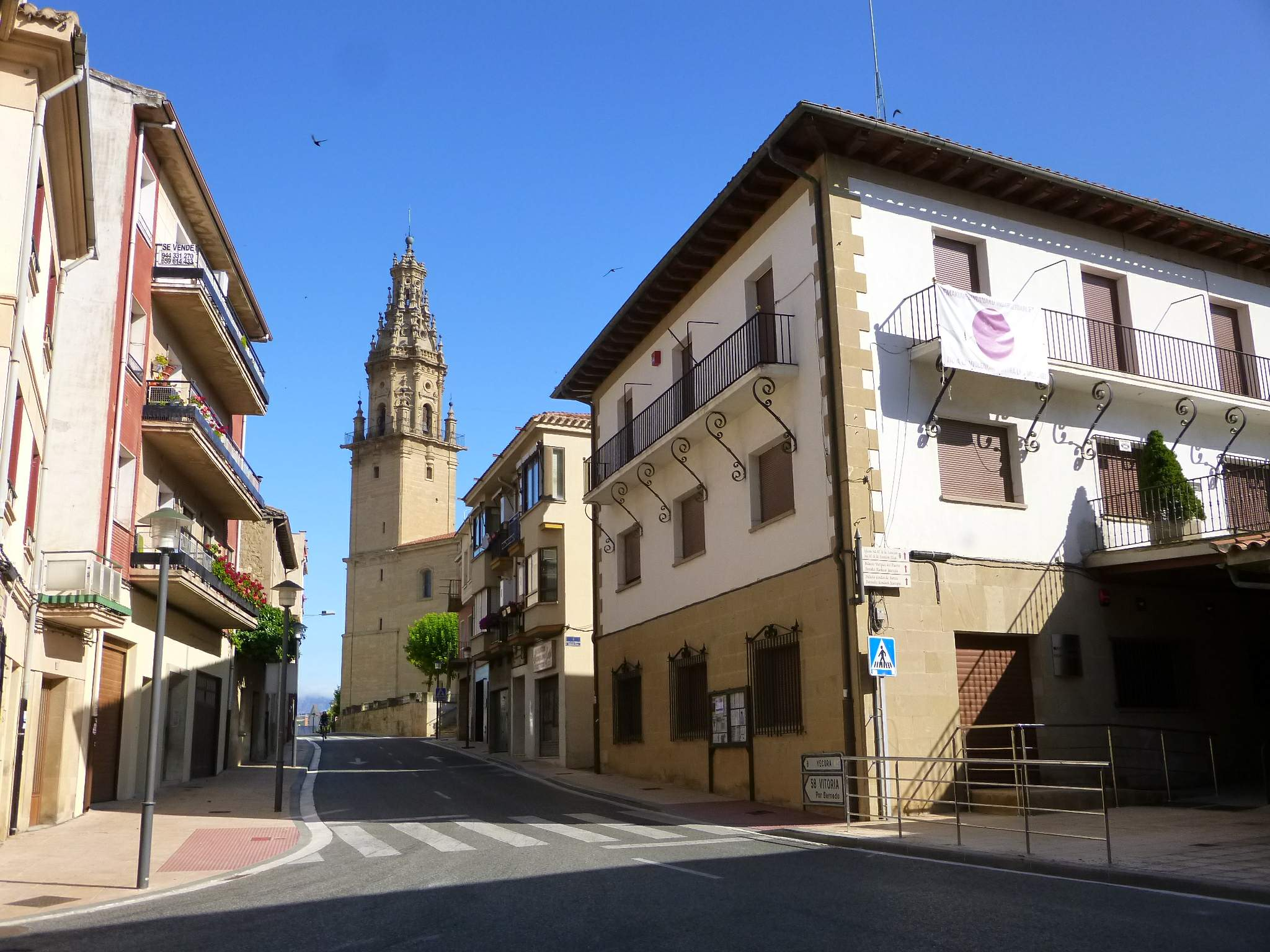 Oyón (Álava)